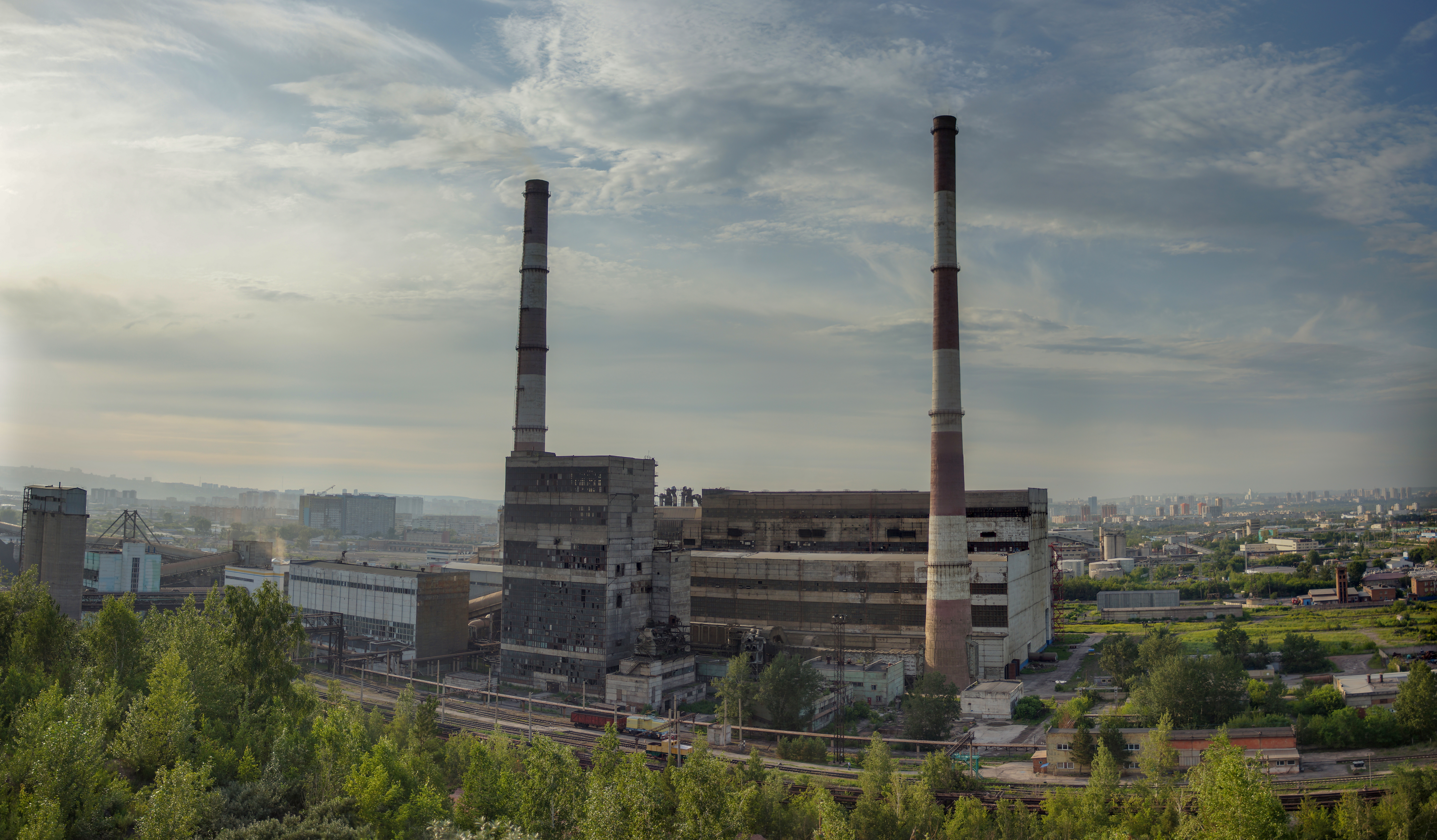 Торгашинское месторождение раннедевонской флоры: Красноярск, Красноярский край Вид на комплекс сооружений красноярской ТЭЦ-2 со стороны Торгашинского местонахождения This image is related to the protected area of Russia number 2410128